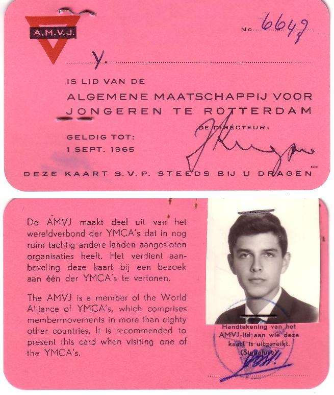 תעודת חבר ימקא הולנד YMCA